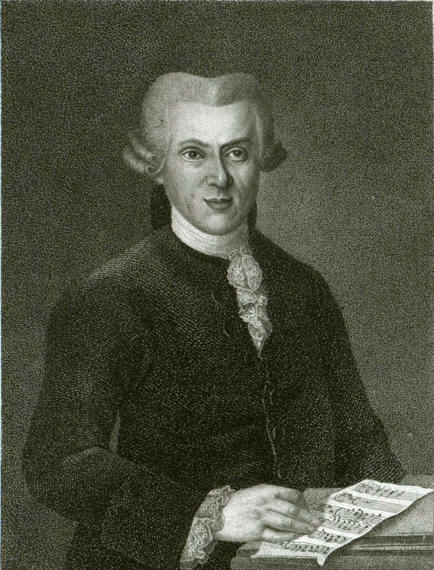 Georg Peter Weimar, Stich von Christian Schule nach Johann Heinrich Schröder